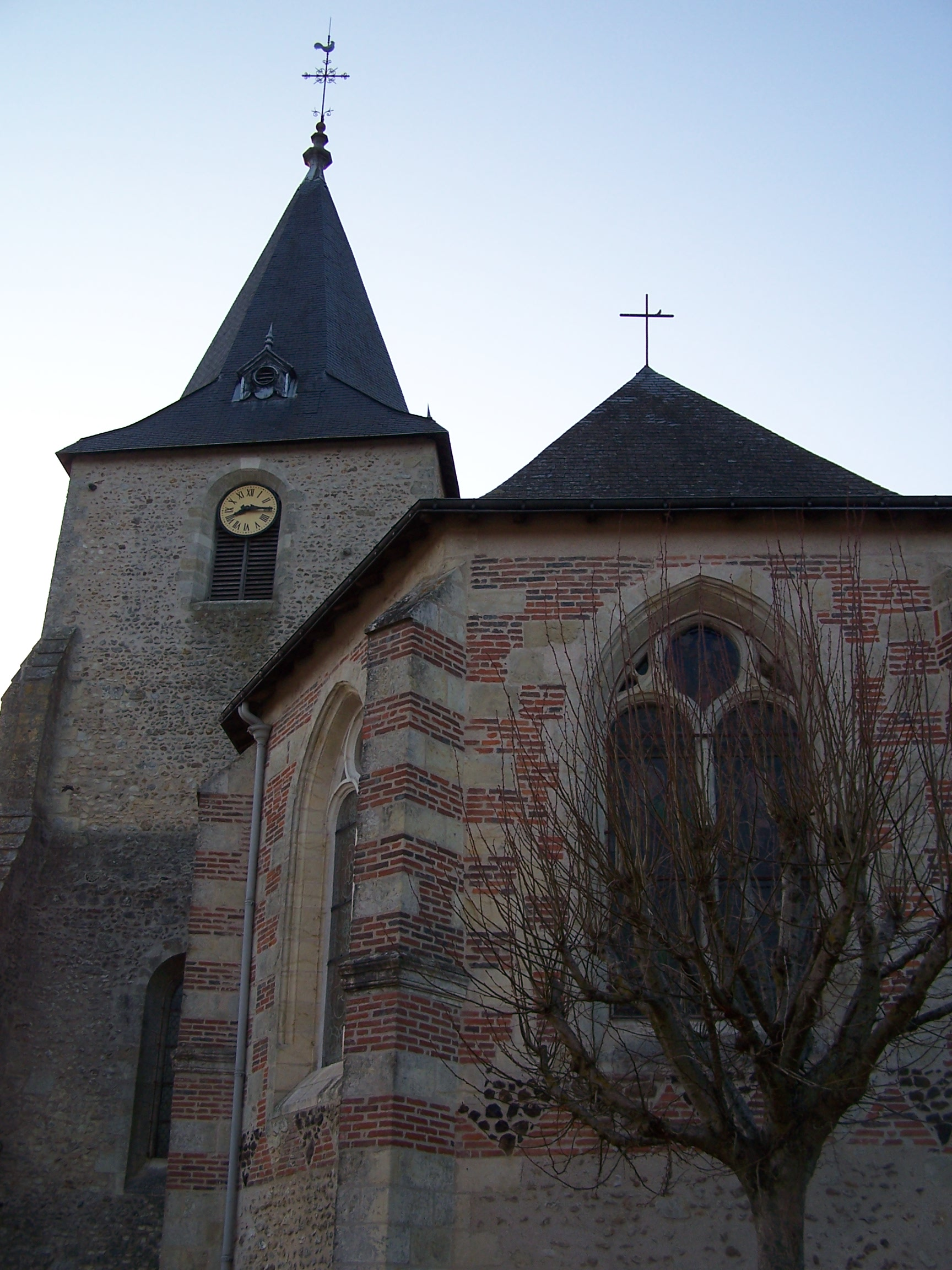 Église Saint-André de Nouzilly (Indre-et-Loire), XVIe siècle, restaurée en 1865